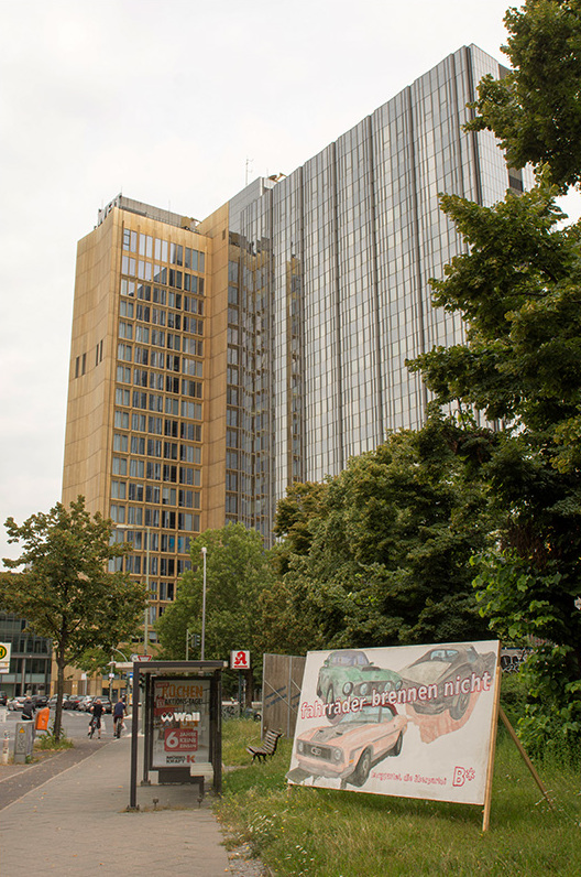 Poster "Fahrräder brennen nicht" der Bergpartei